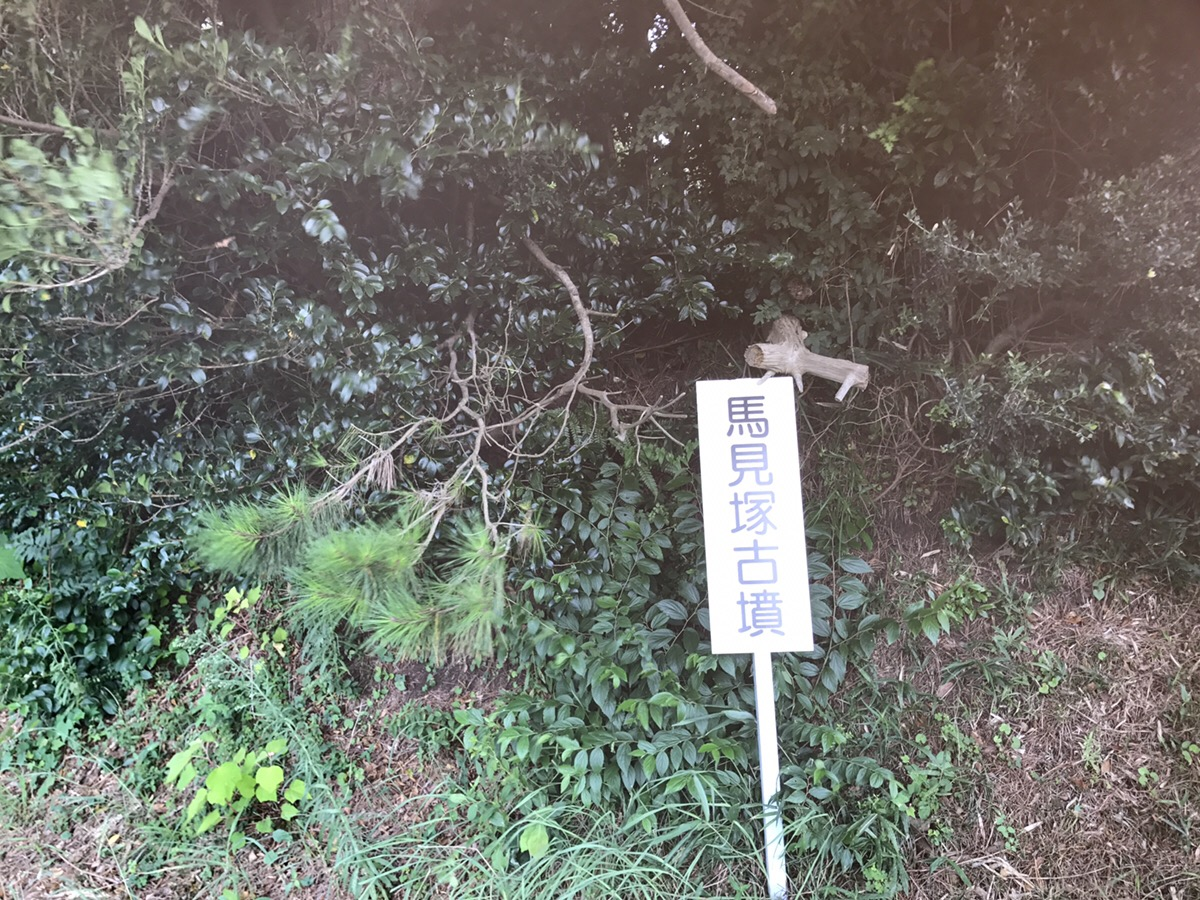 馬見塚古墳